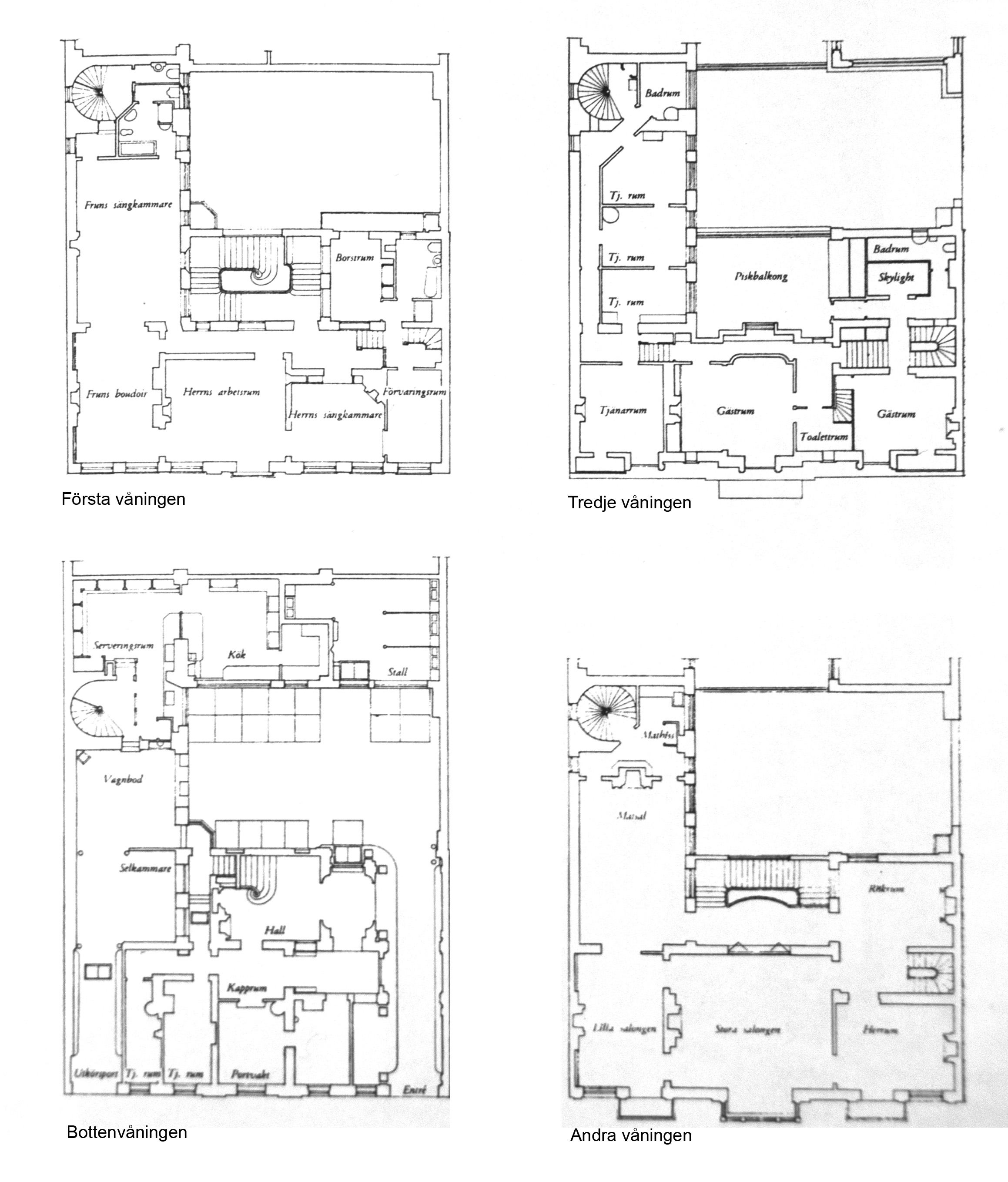 Sagerska huset